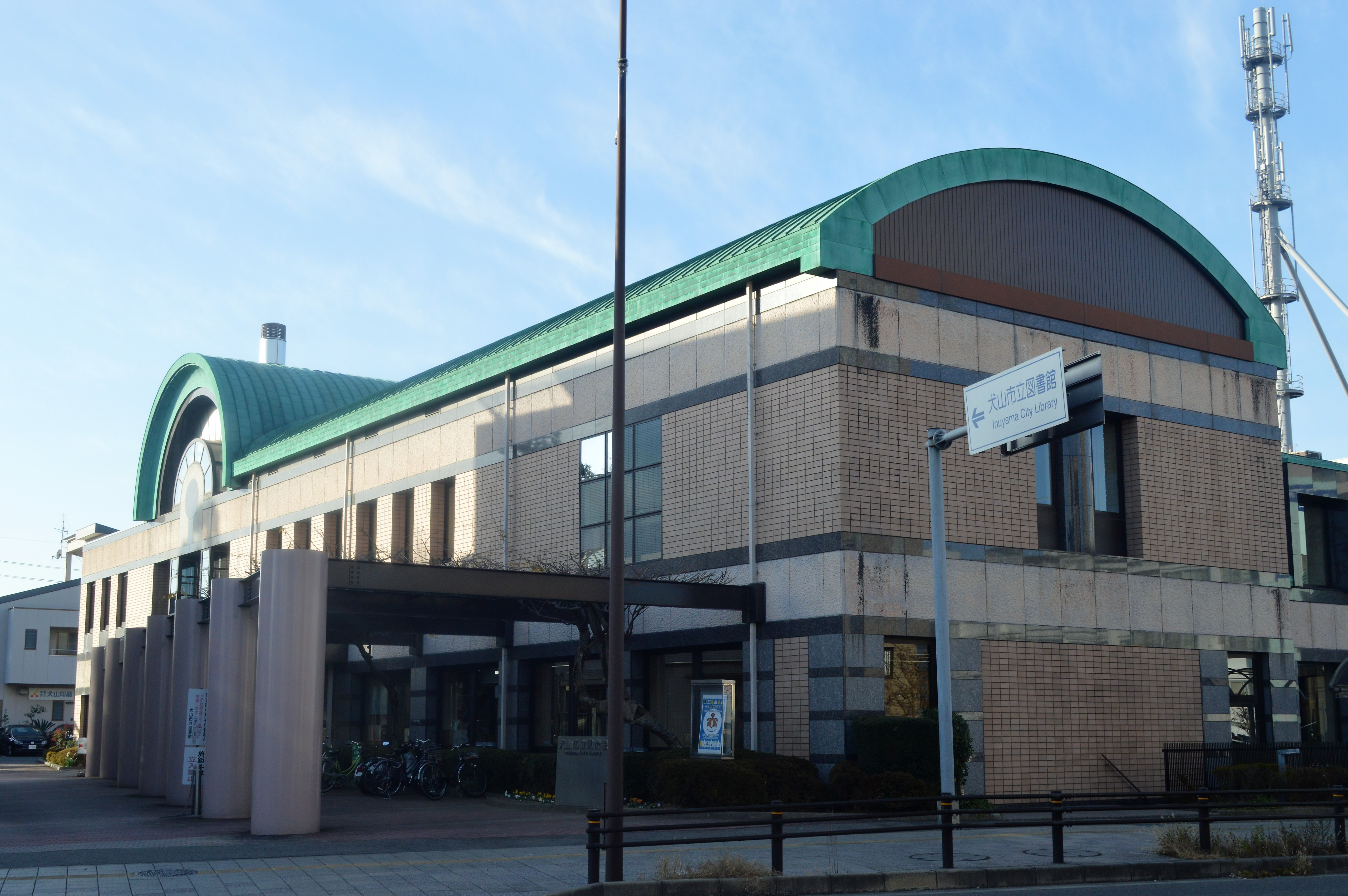 愛知県犬山市の犬山市立図書館。